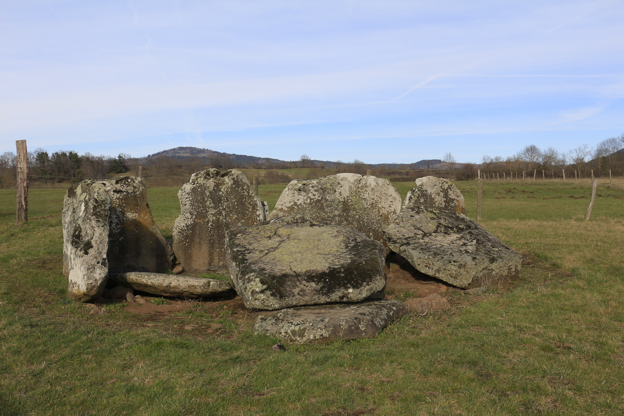 Dolmen "las Tombas de Las Fadas" à Mazeyrat-d'Allier, Haute-Loire, France